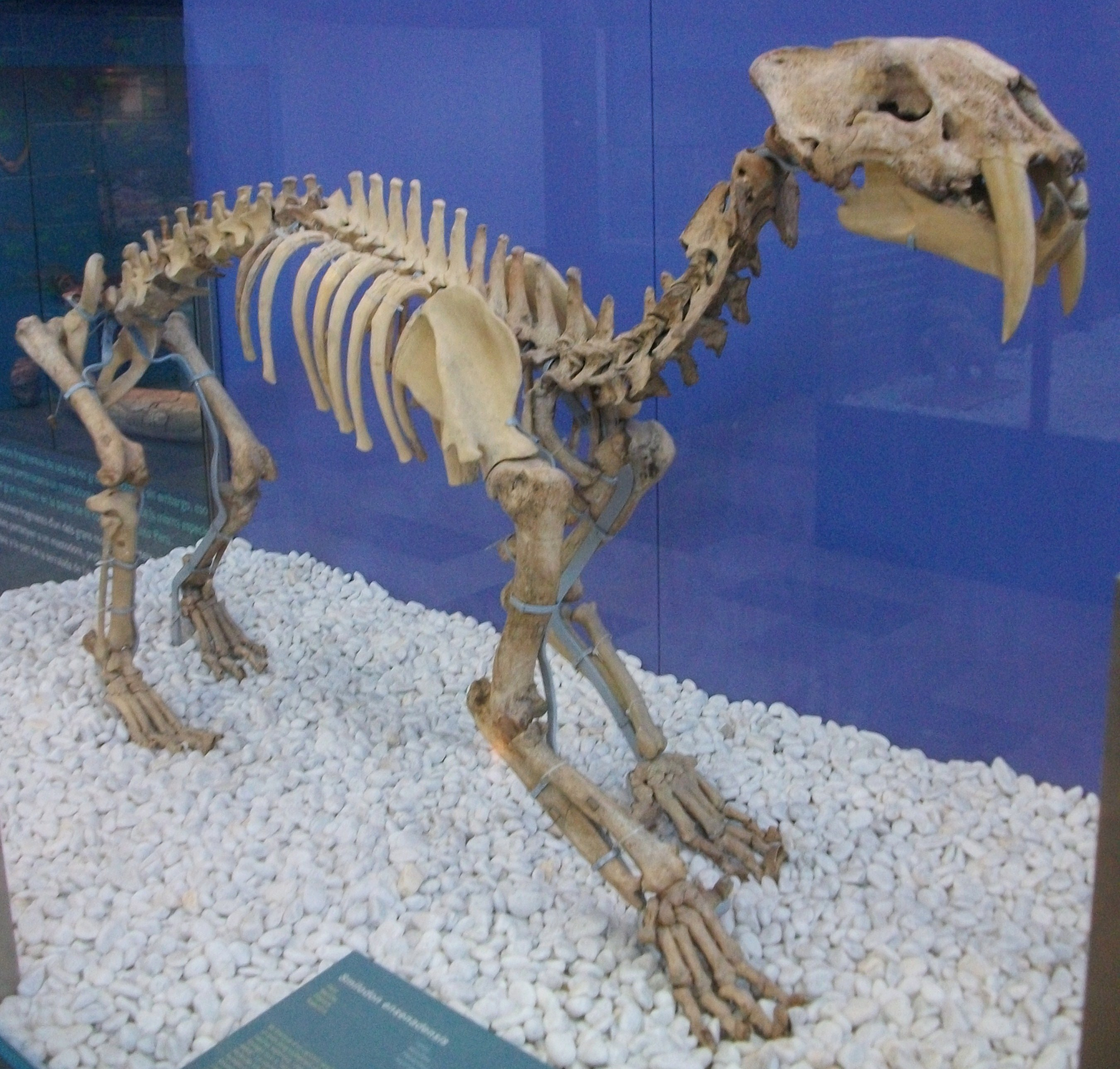 Smilodon populator (formerly Smilodon ensenadensis) al Museu de Ciències Naturals de València.